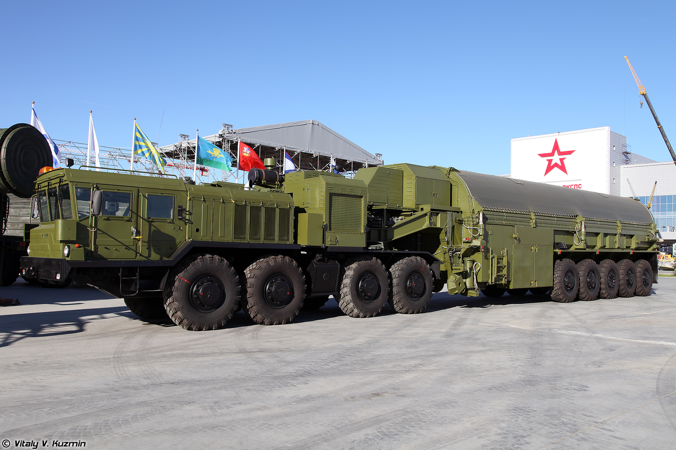 Транспортно-перегрузочный агрегат 3Ф30-9 из комплекса средств наземного обслуживания стратегического ракетного комплекса подводных лодок 3К30 Булава (3Ph30-9 transporter-loader for Bulava SLBM)